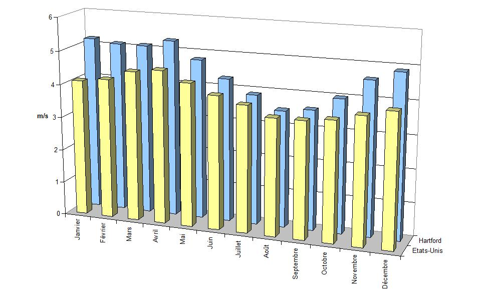 Vent mensuel moyen, à Hartford (Michigan) et dans l'ensemble des Etats-Unis.